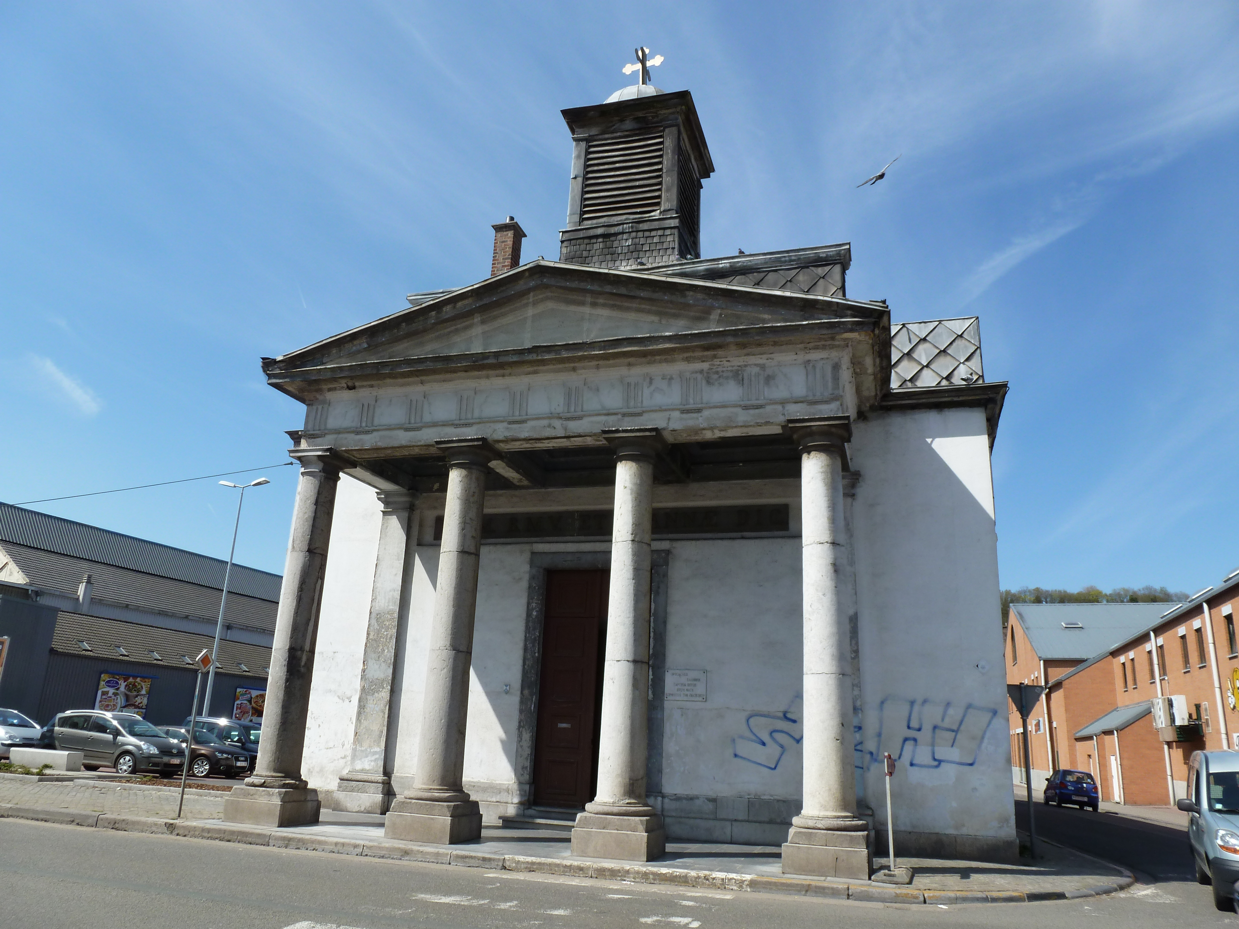 seul élément subsistant de l'Orphelinat des Garçons, antérieurement classé puis démoli.